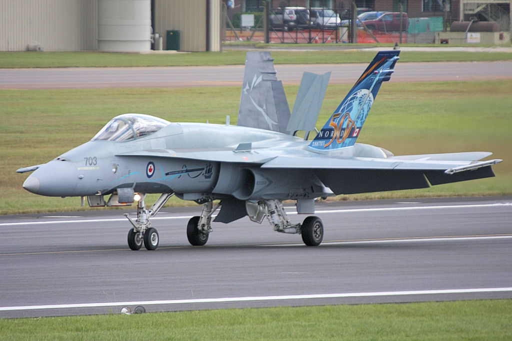 F18 - RIAT 2008